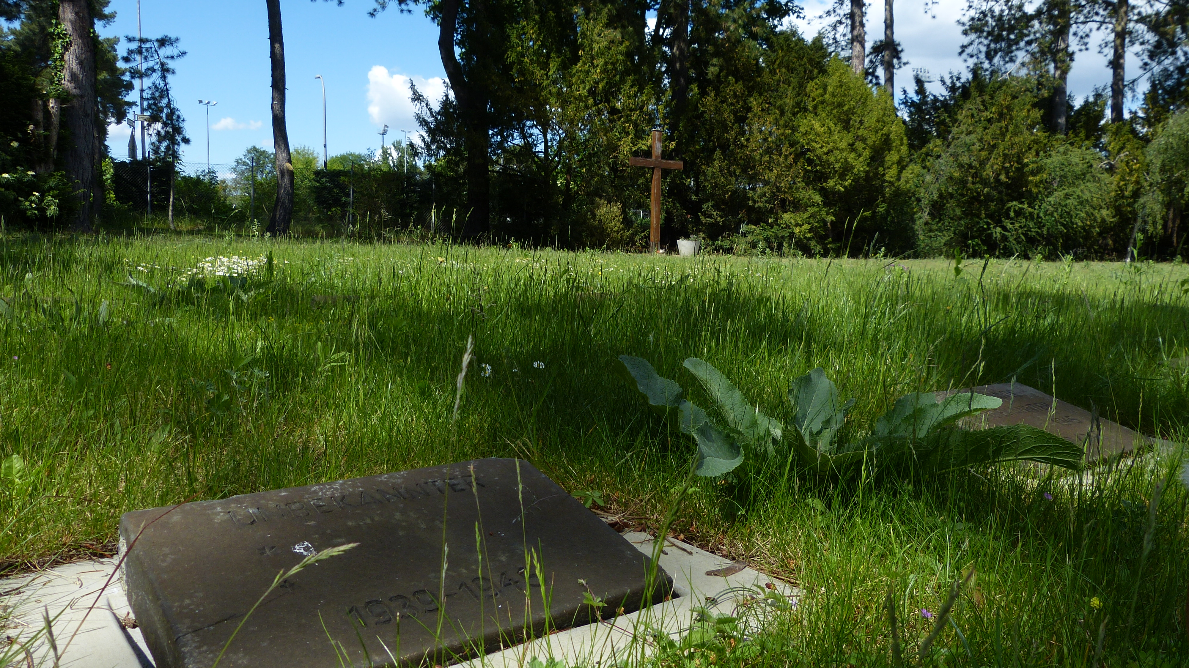 Ein Unbekannter auf nördlichen KGS auf dem Friedhof Zehlendorf